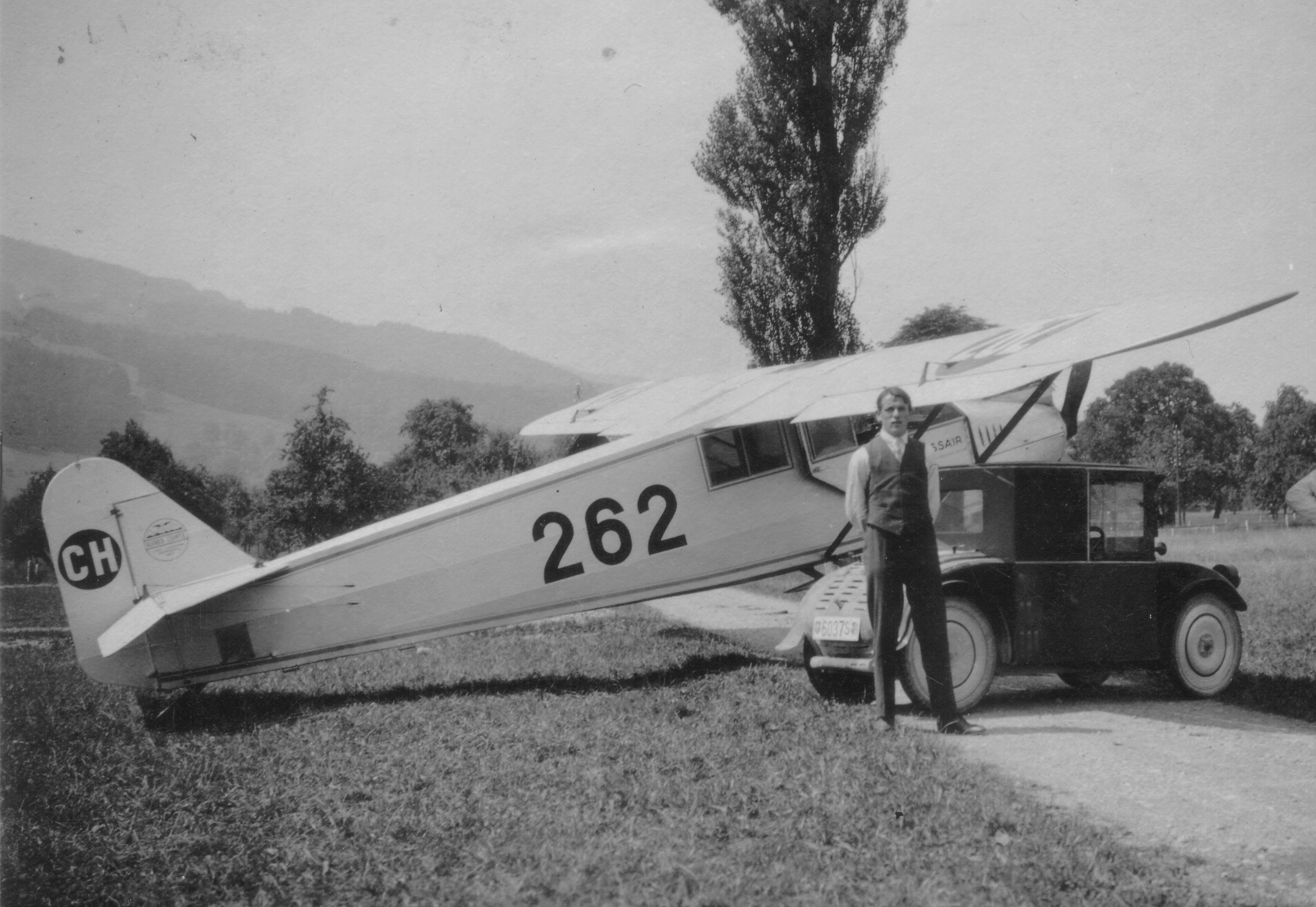 SWISSAIR CH-262 (ab 1934 HB-IKO) auf der Luzerner Allmend. Sommer 1931. Vermutlich einer der ersten kommerziellen Flüge der neu gegründeten Luftfahrtunternehmung SWISSAIR mit der Comte AC-4 im Originalzustand von Zürich/Dübendorf nach Luzern. Im Winter 1933 kompletter Umbau mit neuem 7-Zylinder Sternmotor, neues Fahrwerk und Bemalung. Vorne im Bild Bauunternehmer Otto Notter mit einem seiner Fahrzeuge, ein Hanomag 2/10 des gleichnamigen Baumaschinenherstellers.